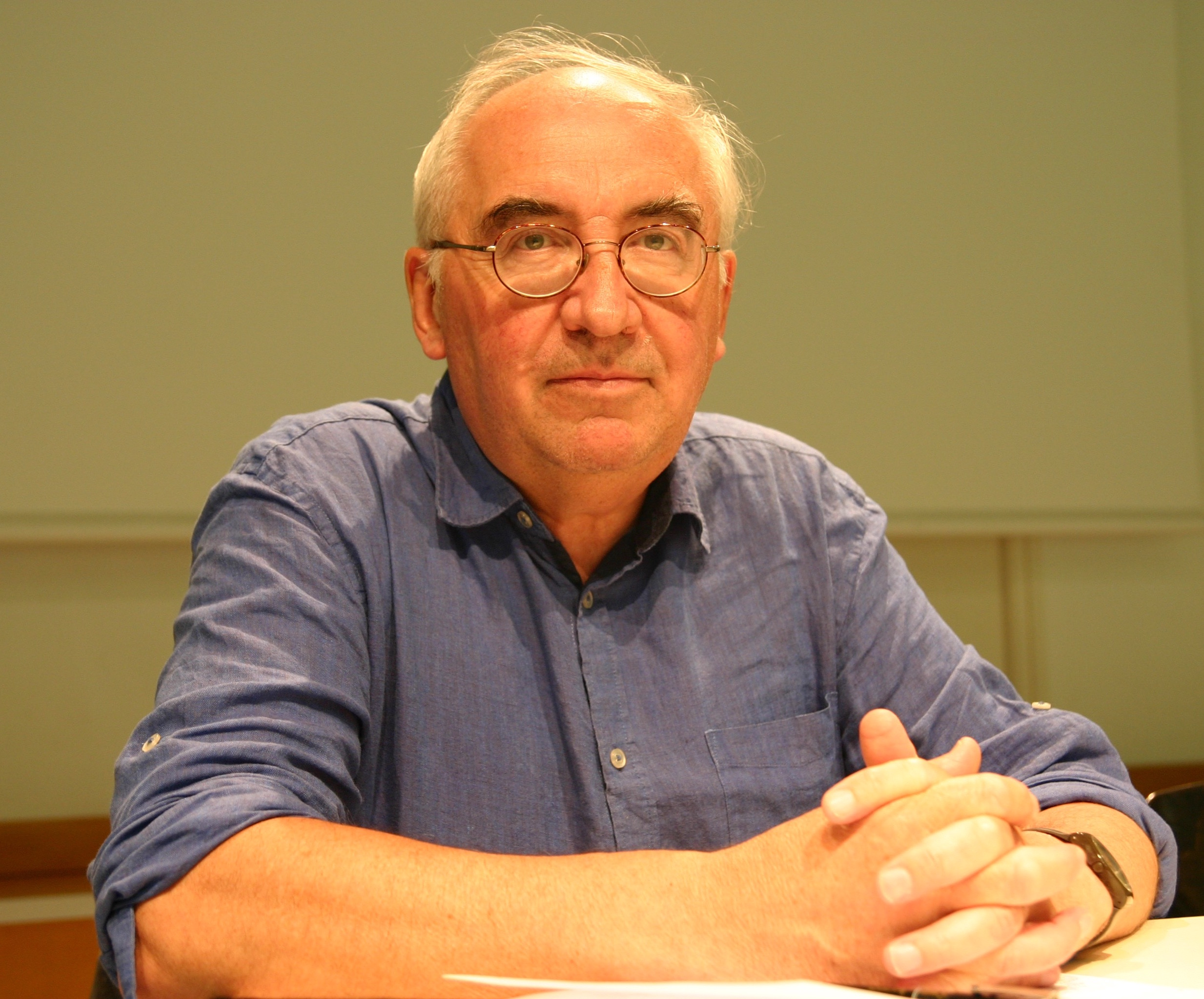 Christian Laval, lors d'un conférence à Bourges le 8 juin 2016.